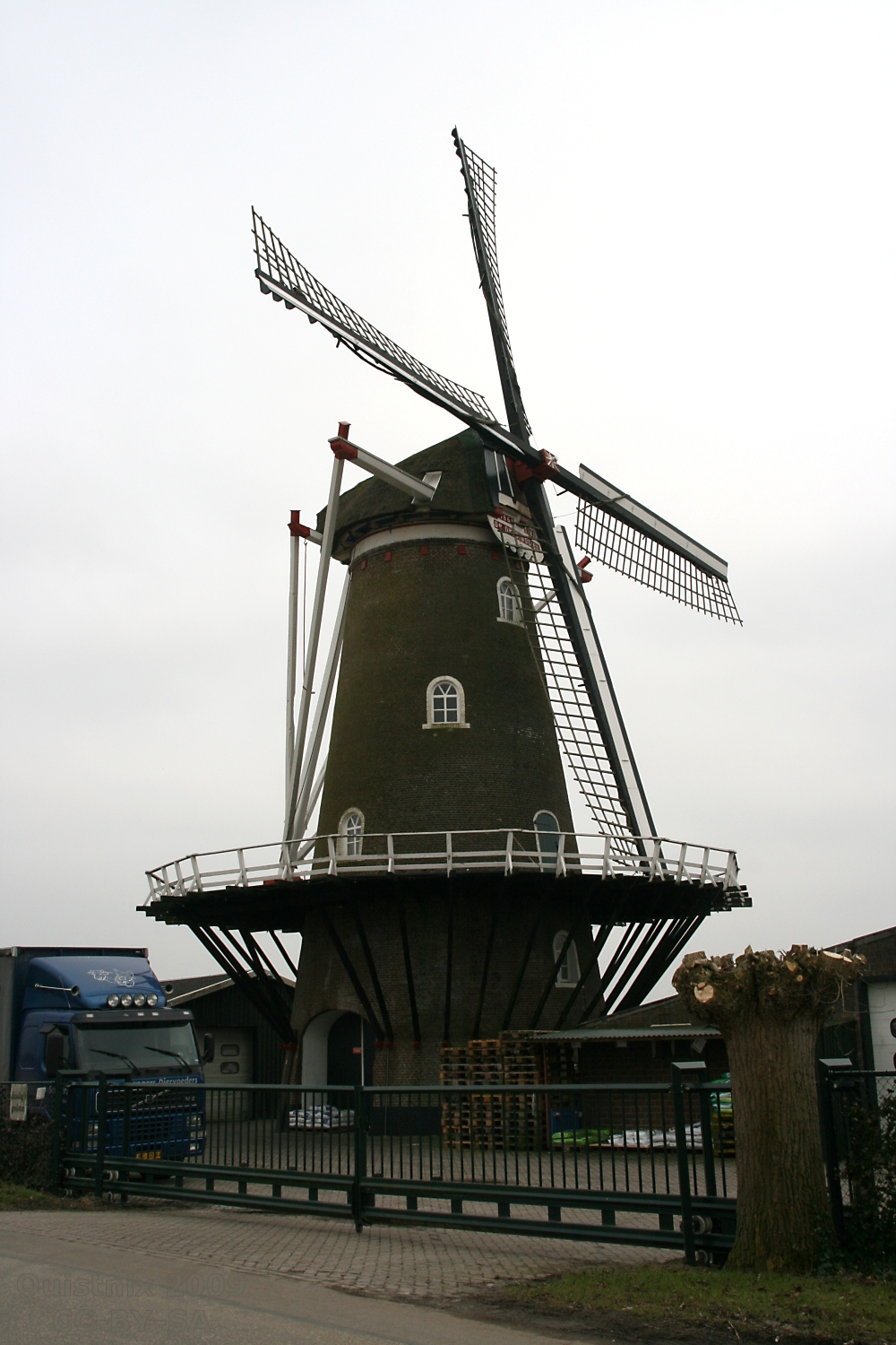 Afferden: Molen De Drie Waaien